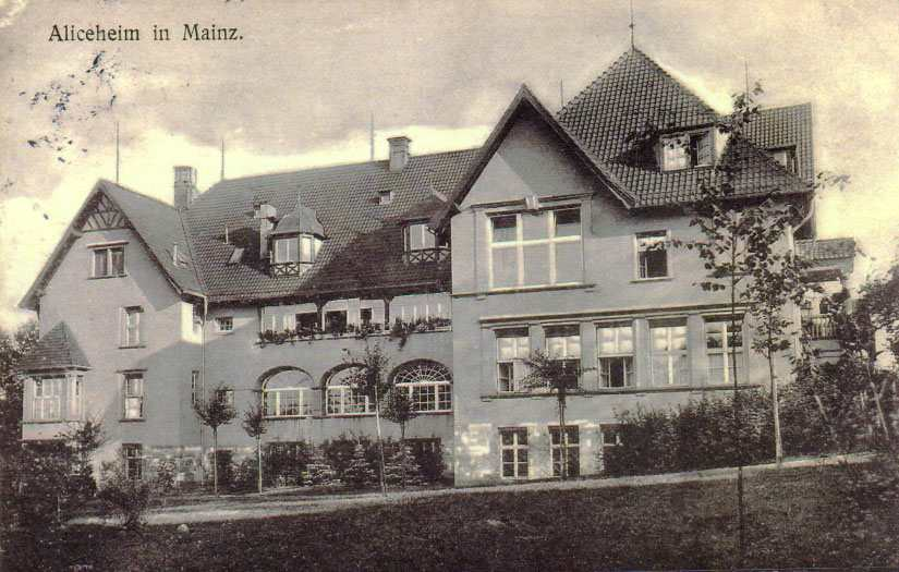 Bild enthält eine Postkarte von 1907 des Aliceheims